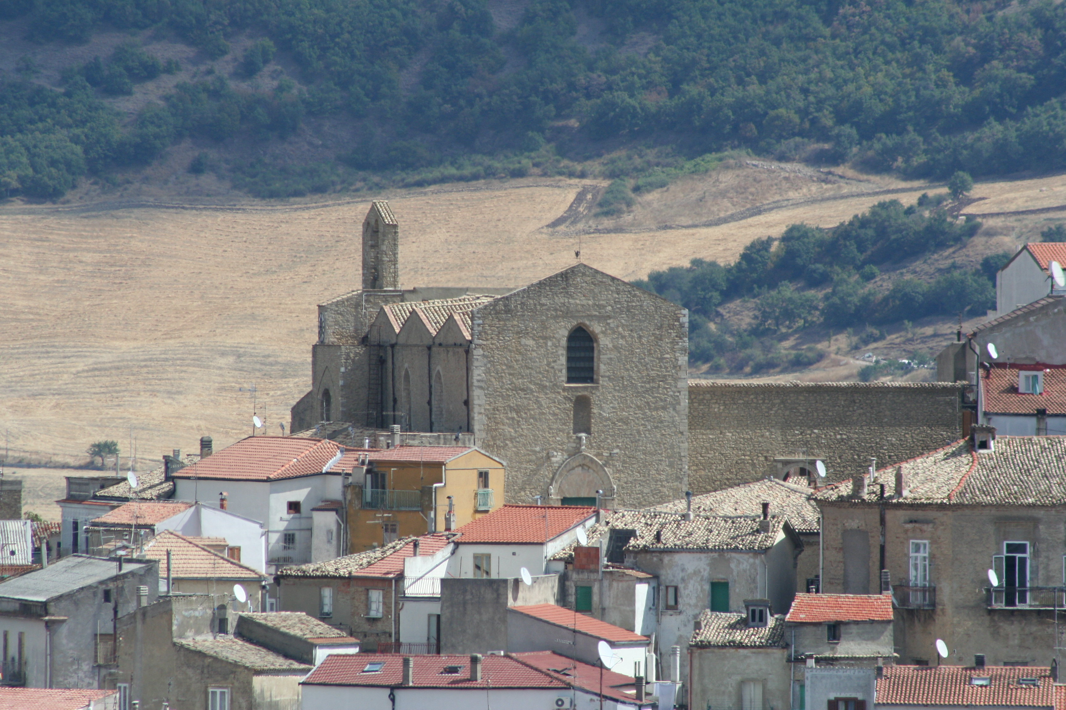 Autore: Rocco Stasi, fatta da me. Chiesa di San Francesco d'Assisi, con annesso convento oggi adibito a sede del Centro di documentazione "Rocco Scotellaro". Realizzata (o ampliata) nel 1314 sulle strutture di un piÃ¹ antico insediamento religioso. GFDL, sono l'autore